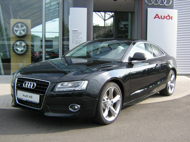 Audi A5